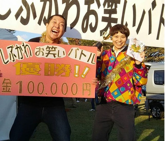 2018年10月